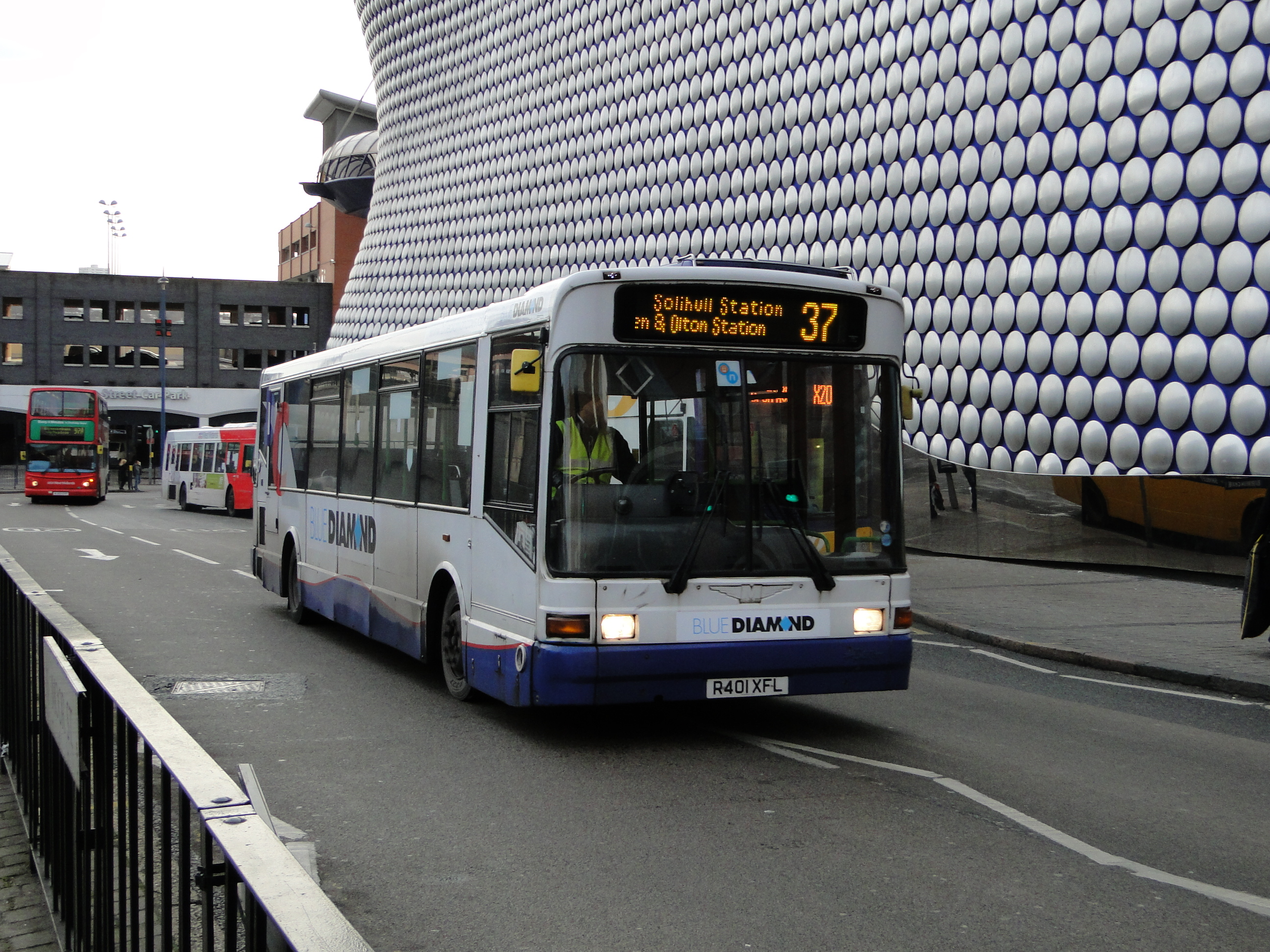 R401 XFL